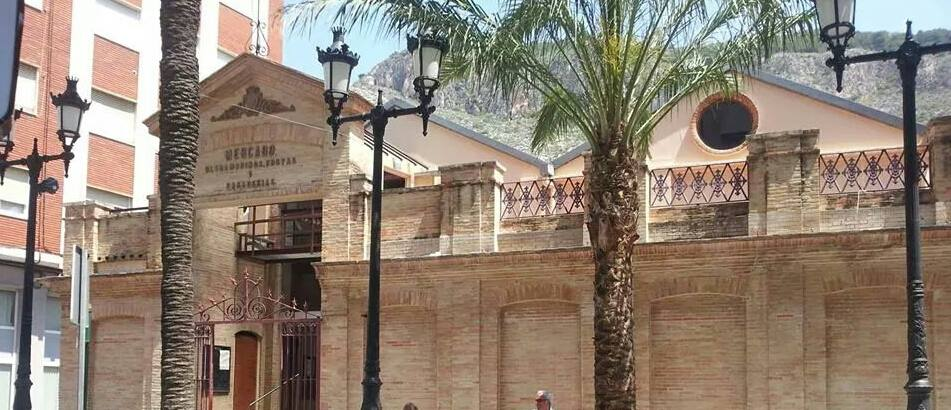 Mercat de Cullera (Valéncia).